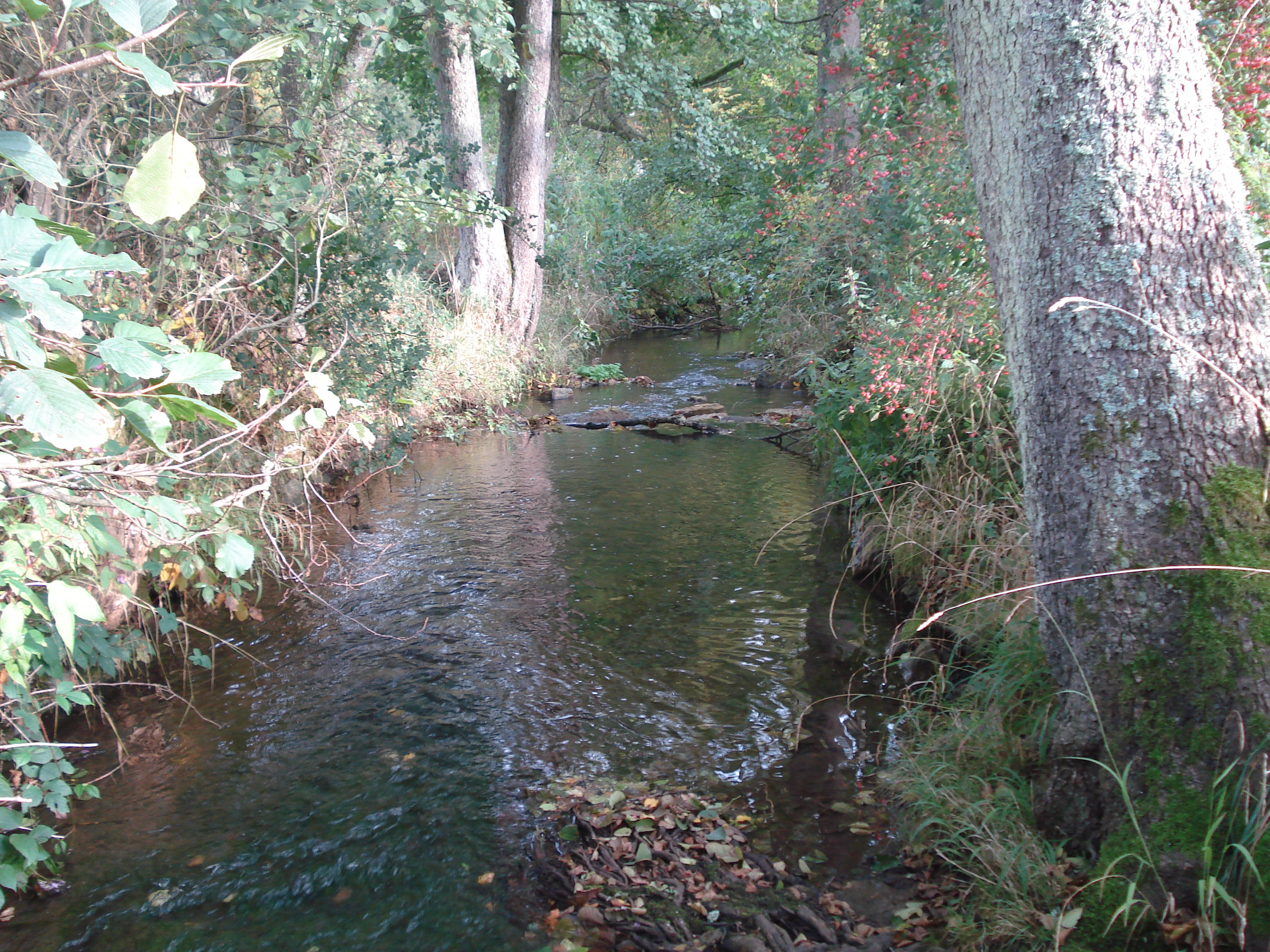 Das Steinbächle kurz vor seiner Mündung